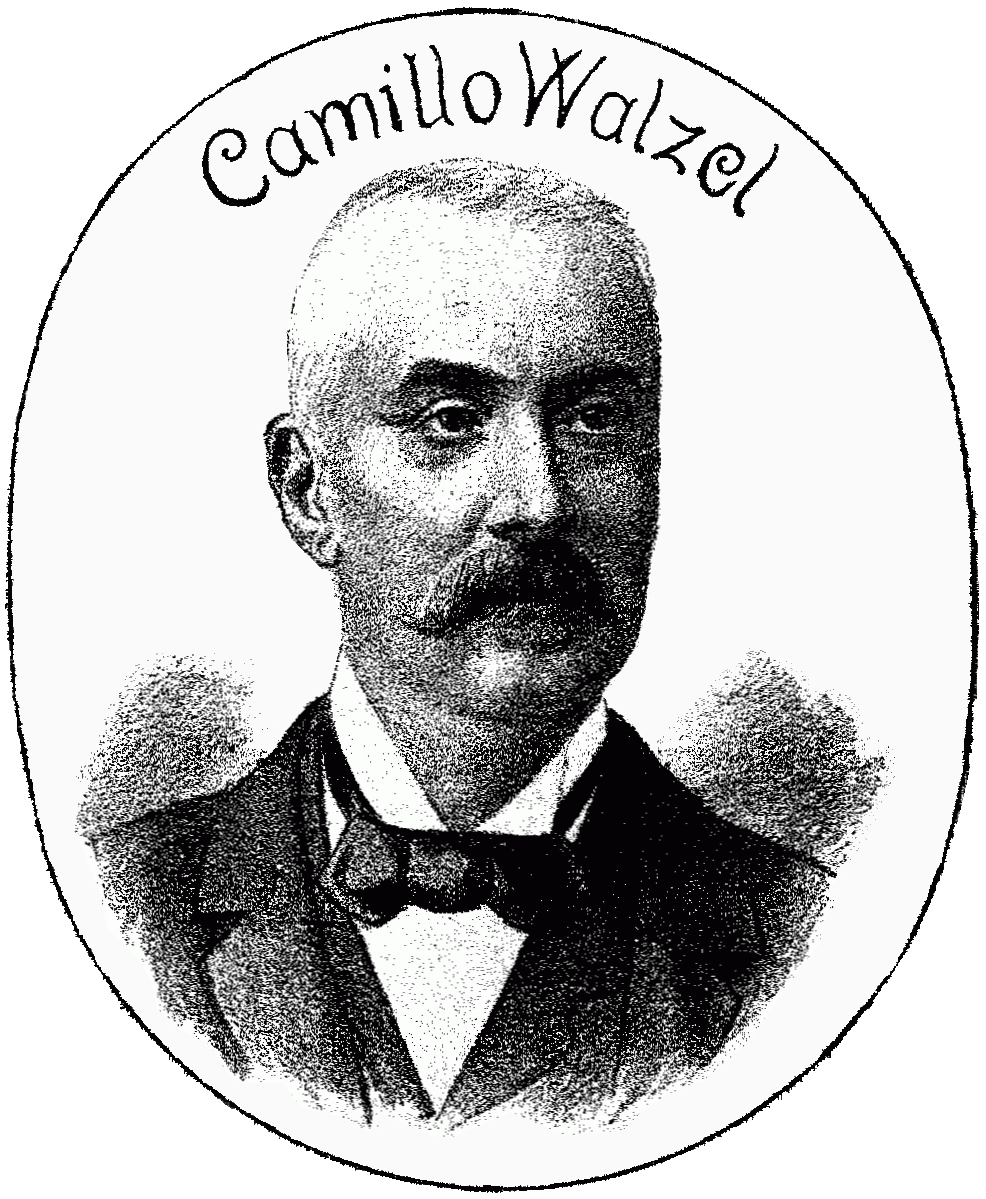 Camillo Walzel (Artist name: Friedrich Zell; 1829-1895), Austrian writer and librettist